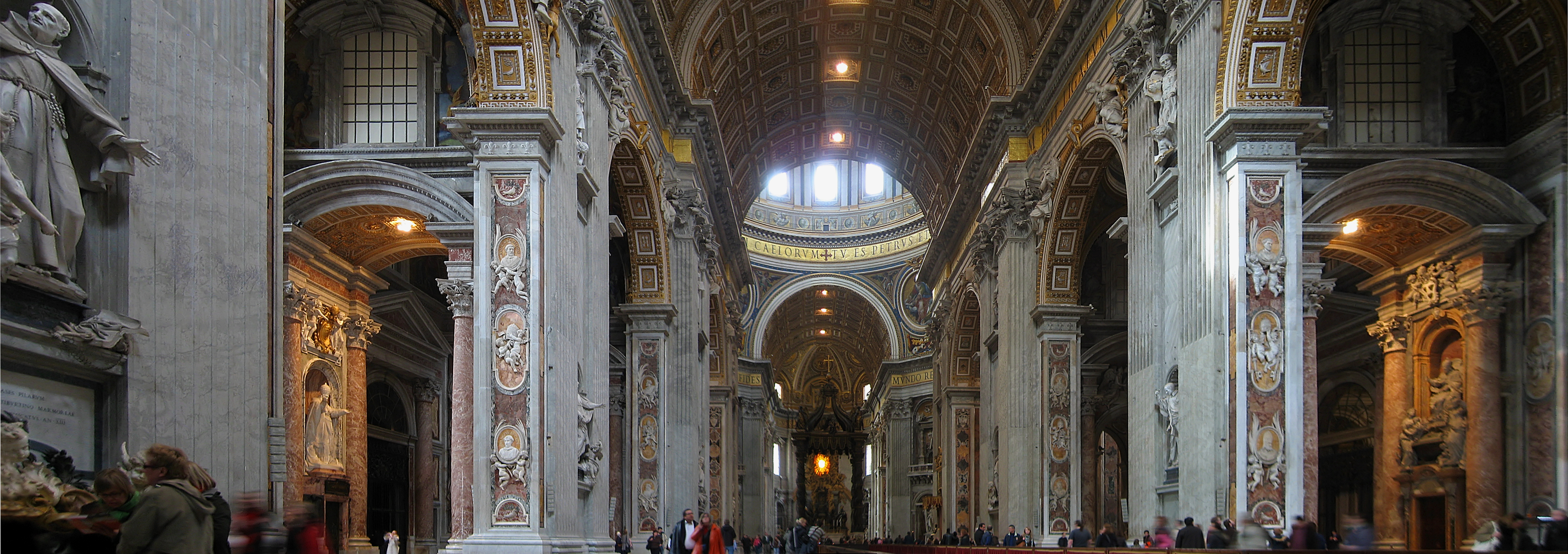 Petersdom in Rom/Italien, Mittelschiff